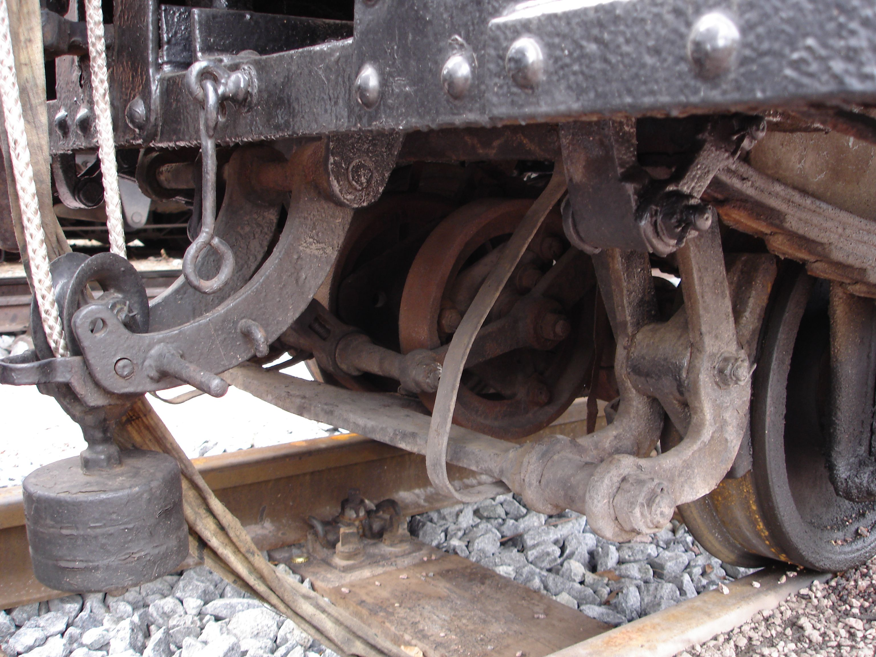 Heberleinbremse an einem sächsischen Schmalspurwagen